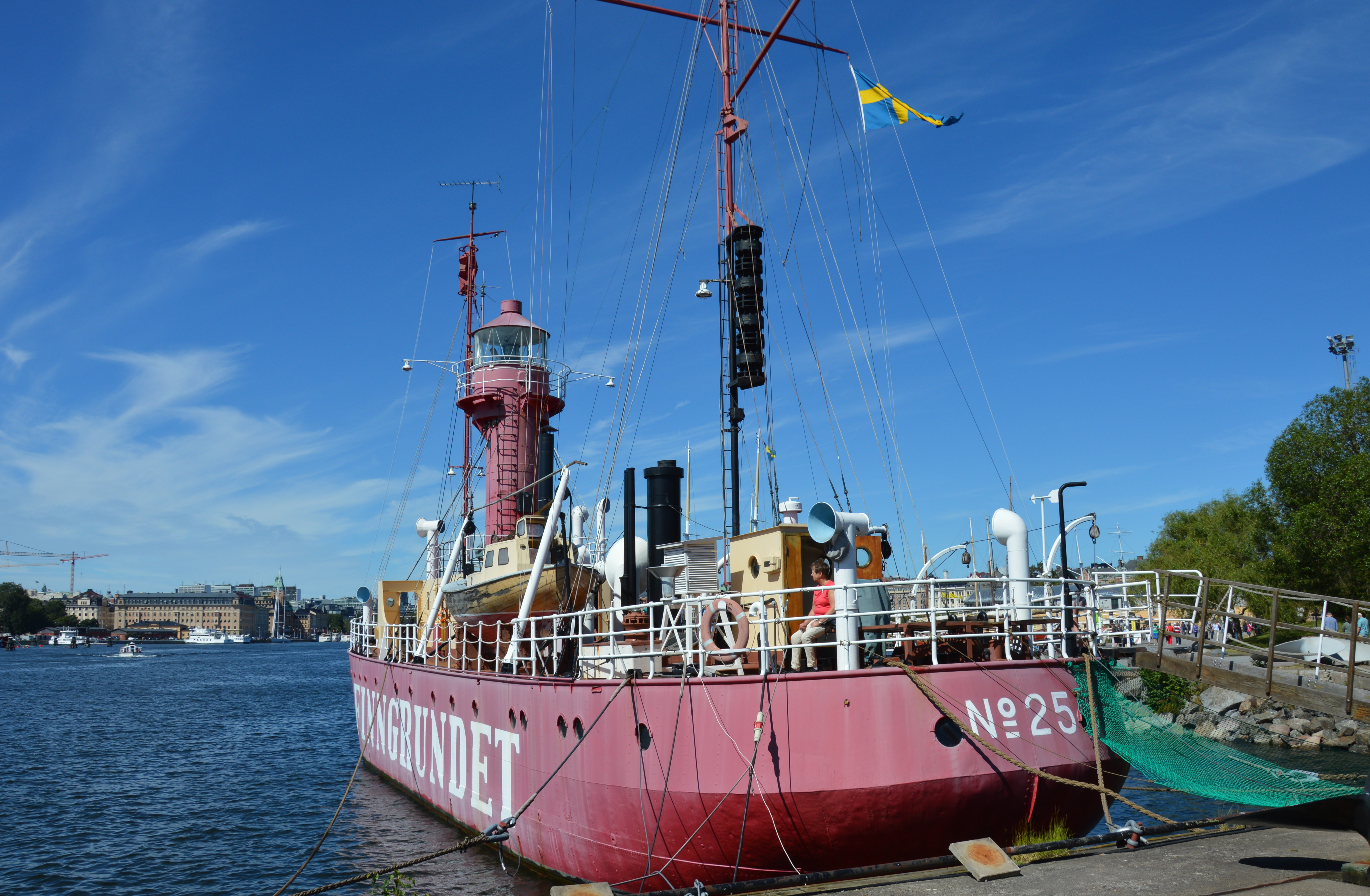 Feuerschiff Fingrundet 25 in Stockholm